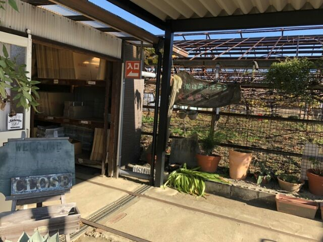 愛知県春日井市の企業「後藤サボテン」営業所の入り口